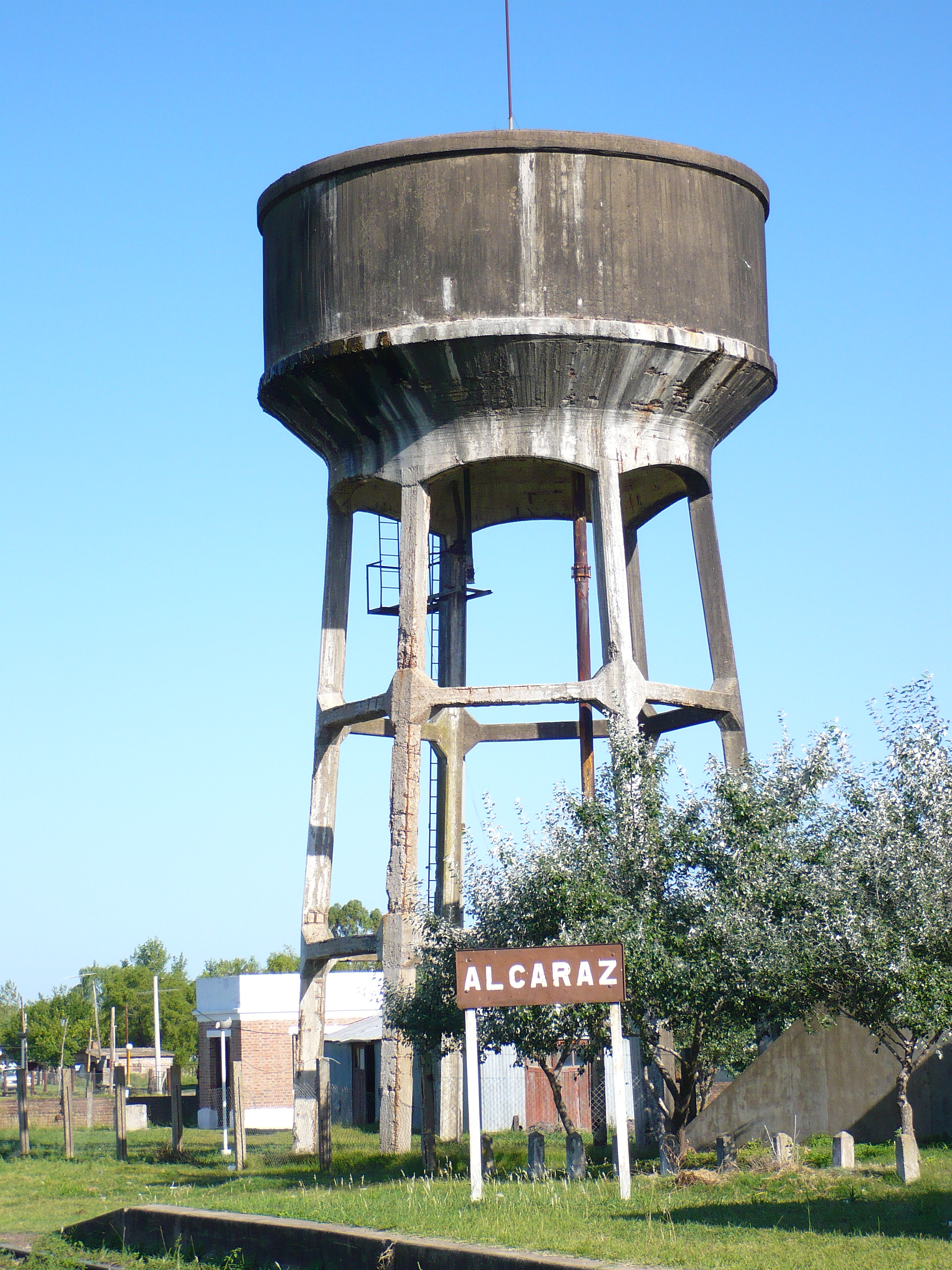 Tanque del agua